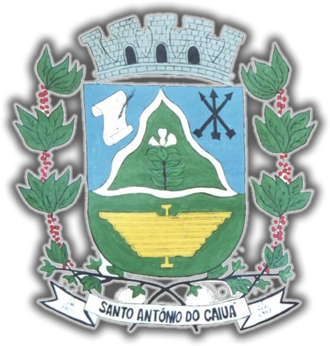 Brasão de Armas do município de Santo Antônio do Caiuá, Paraná, Brasil.